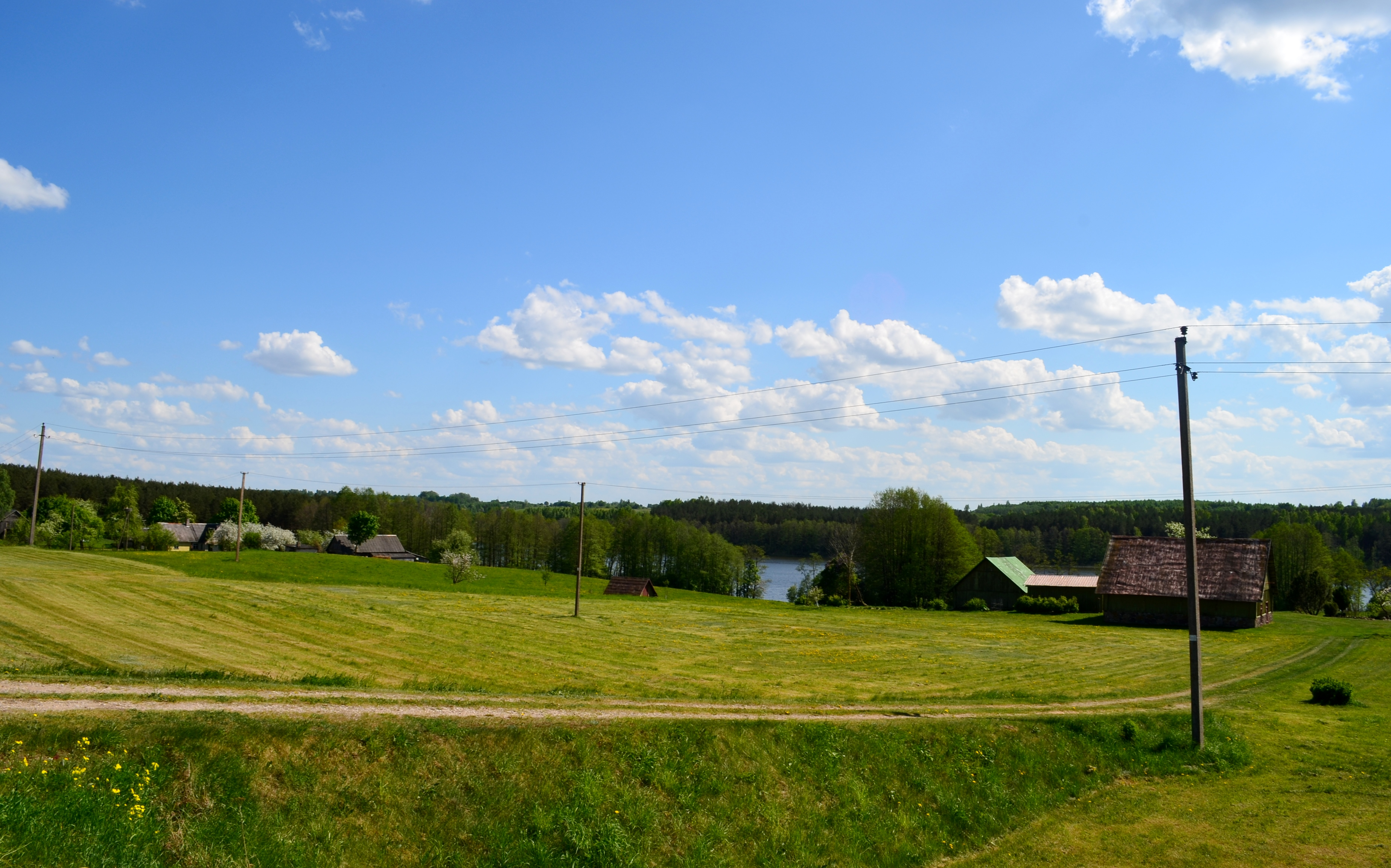 Čereškos, Balninkų sen., Molėtų raj.